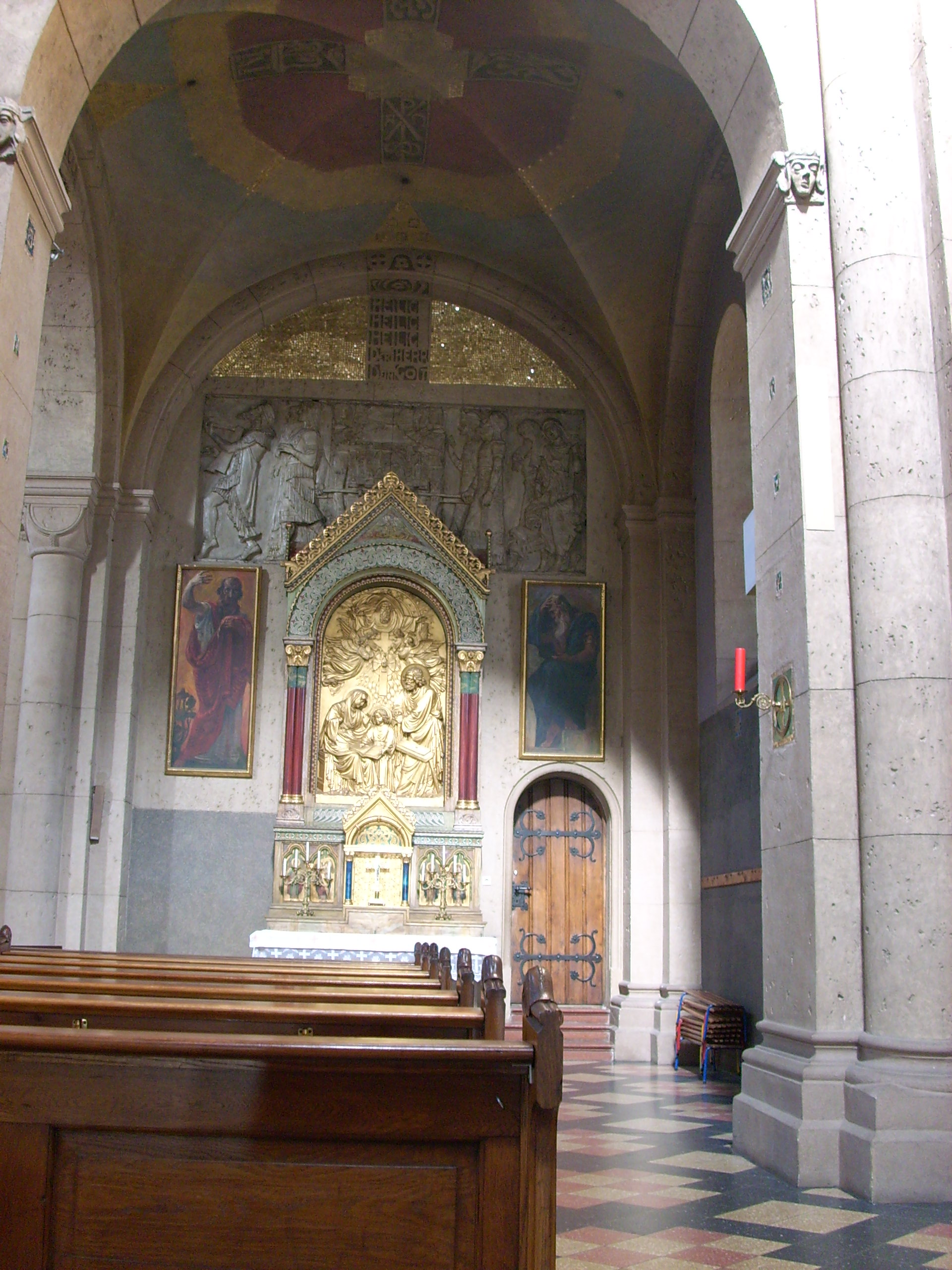 Blick zum rechten Seitenaltar, St. Josef (Weiden in der Oberpfalz)